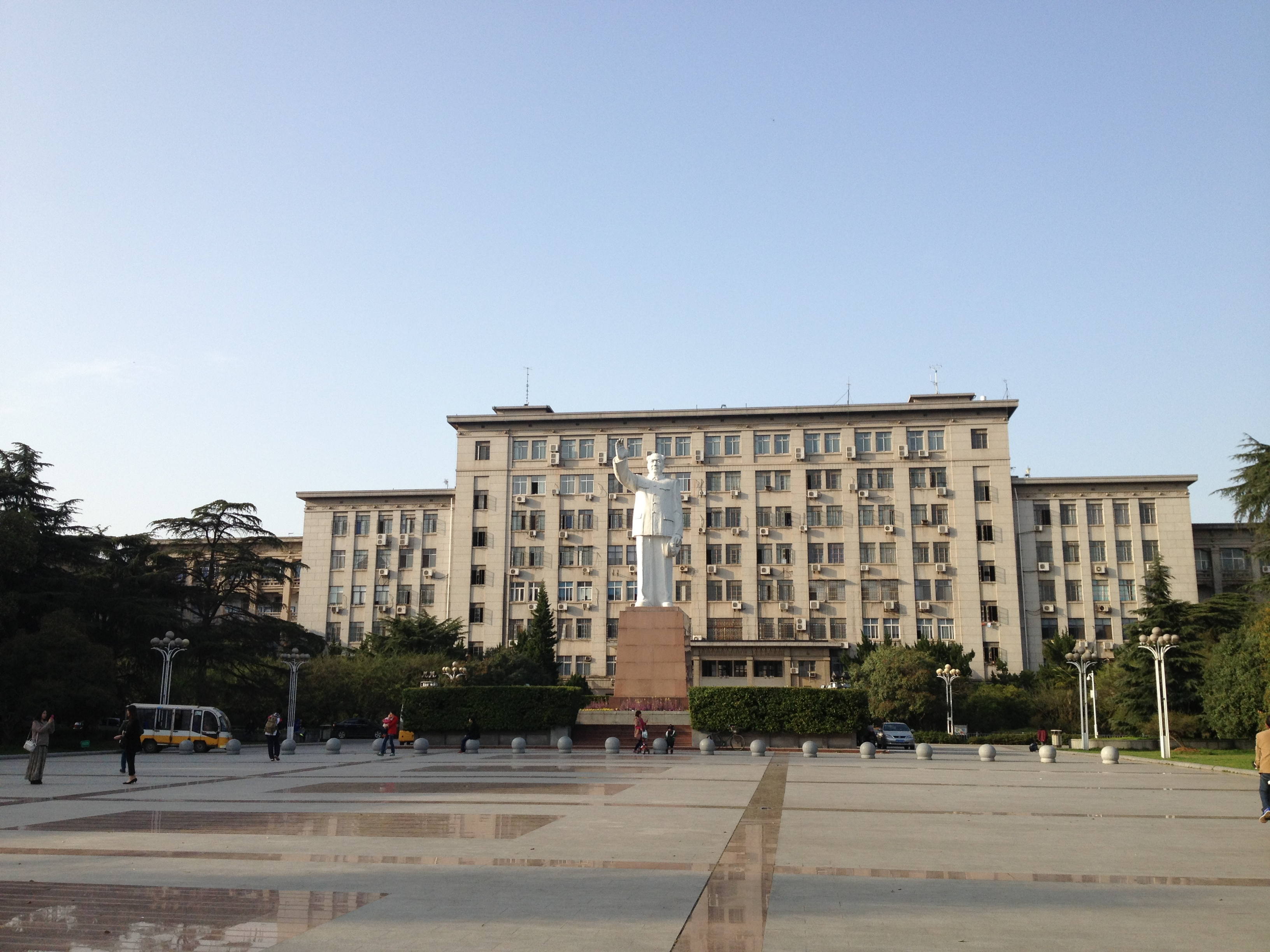 南一楼前广场、毛像